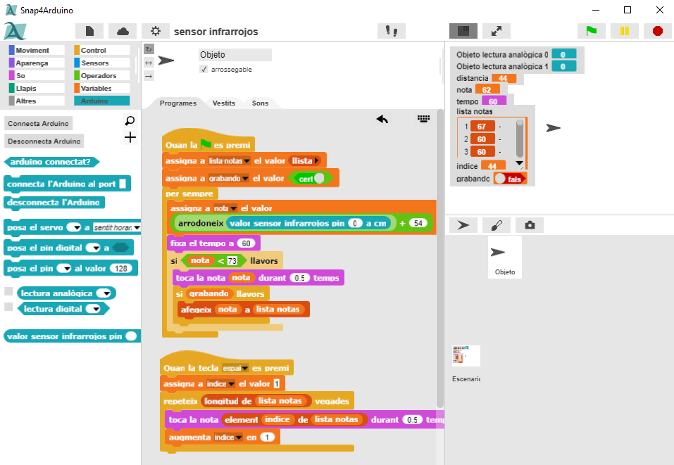 Entorn de programació Snap4Arduino. Snap4Arduino és una modificació de snap! amb blocs específics per a interactuar amb plaques Arduino. Exemple de programa.